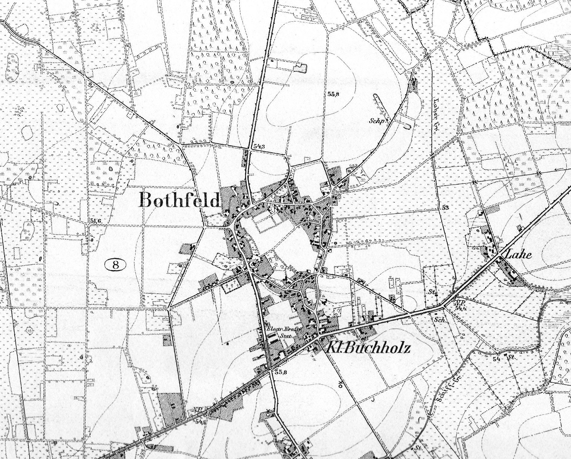 Meßtischblatt (Maßstab 1 . 25.000) von 1897/98 der Königlichen Preußischen Landesaufnahme, die im Jahr 1896 stattfand. Ausschnitt aus den zusammengefügten Blättern Nr. 1954 und Nr. x (?)